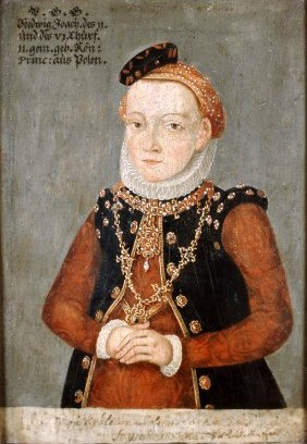 Portret Jadwigi Jagiellonki (1513-1573)